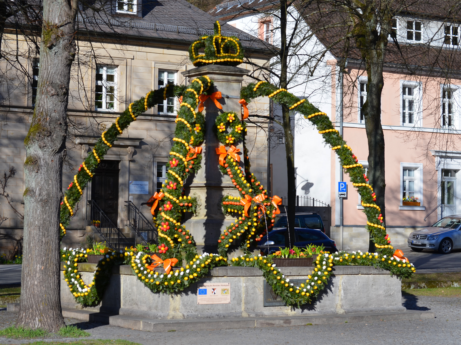 Osterbrunnen am Marktplatz in Goldkronach (Oberfranken)